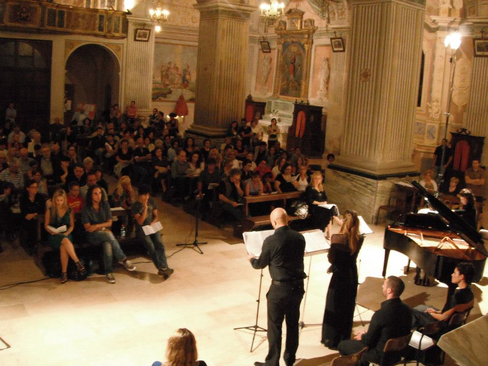 Am 2. September 2012 war er der Kurator und Schöpfer der historischen Wiederaufführung der Oper "Maria sul Monte" von Primo Riccitelli, die zuletzt 1914 aufgeführt wurde. Mit der Teilnahme der Schauspielerin Amanda Sandrelli als Schauspielstimme.